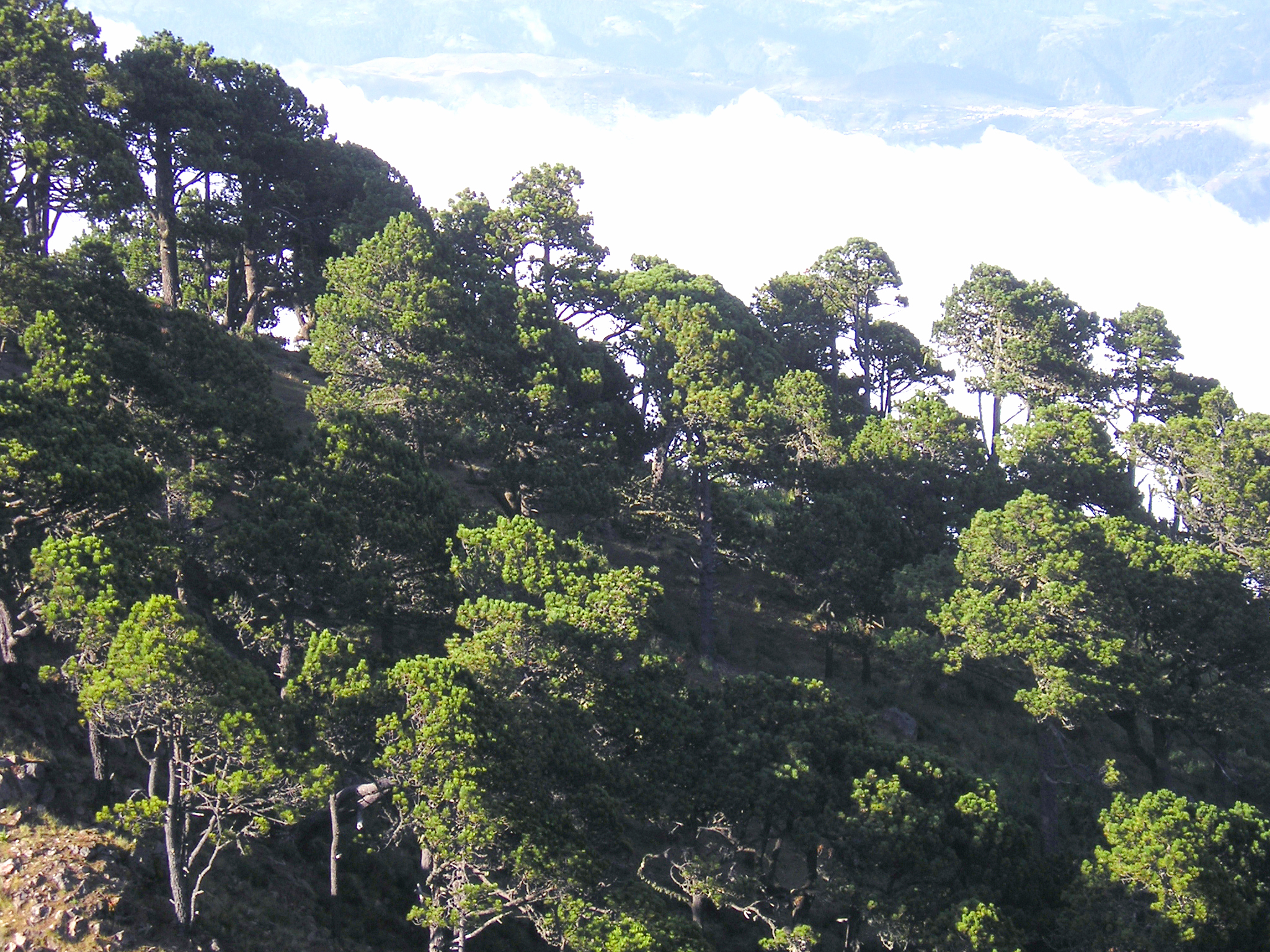 Pinus hartwegii forest. Volcán Tajumulco, Guatemala.